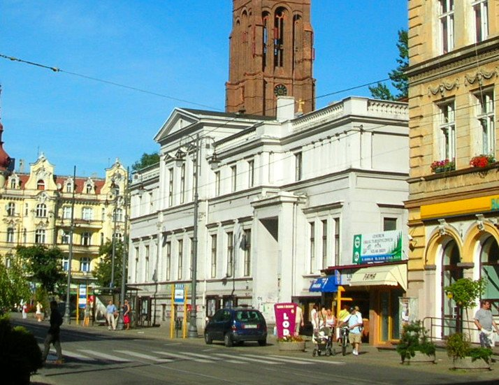 Kamienica ul. Gdańska 20 w Bydgoszczy